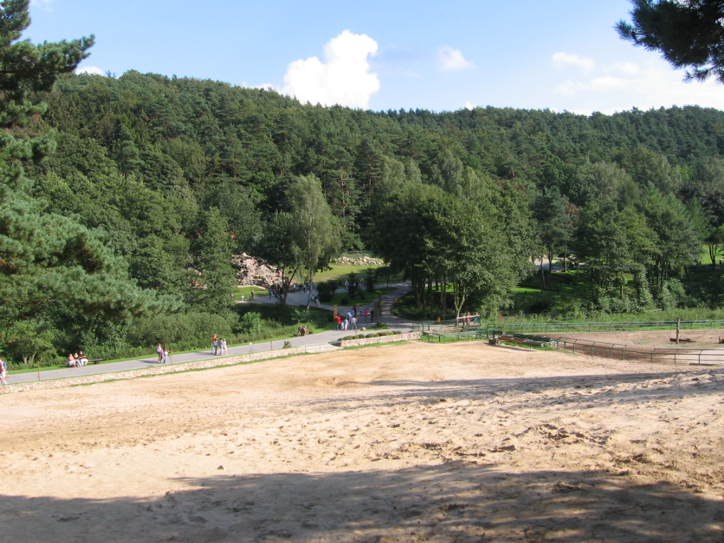 Miejski Ogród Zoologiczny Wybrzeża